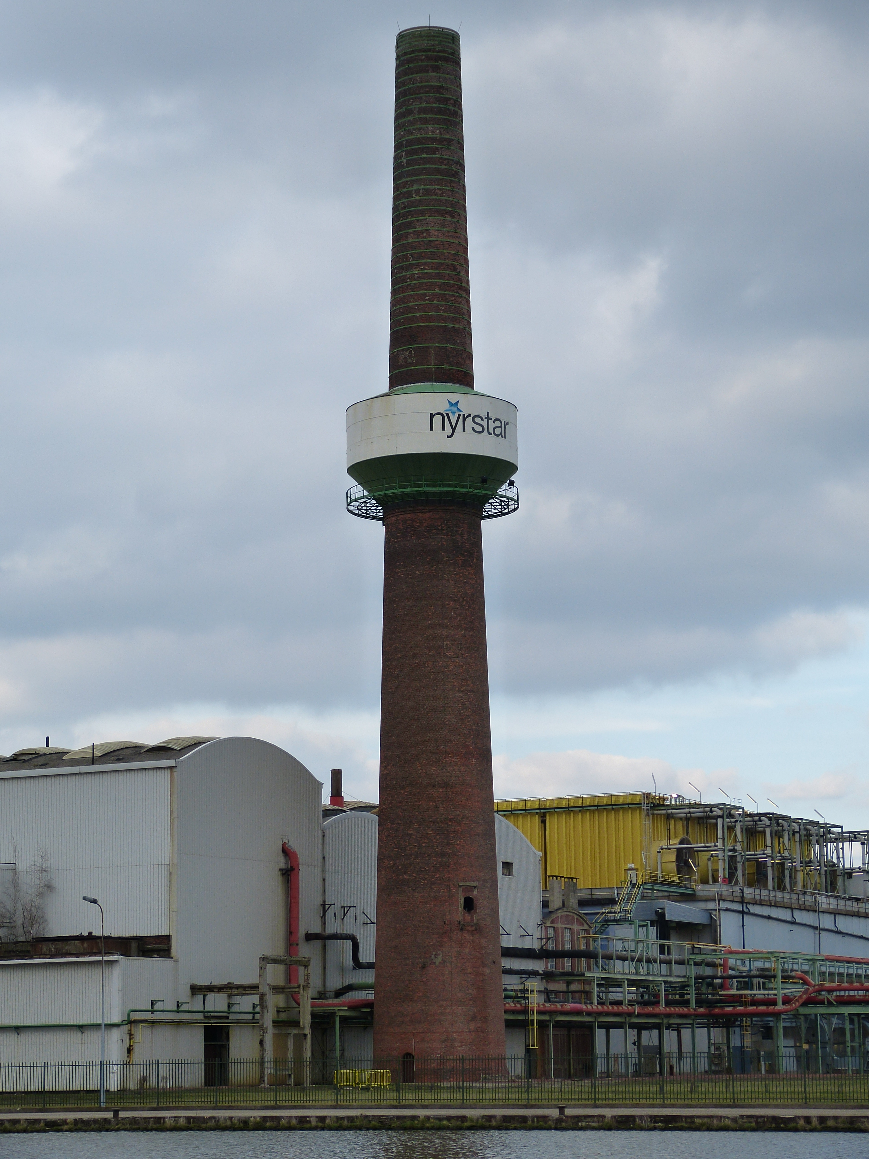 Balen Zinkstraat Watertoren